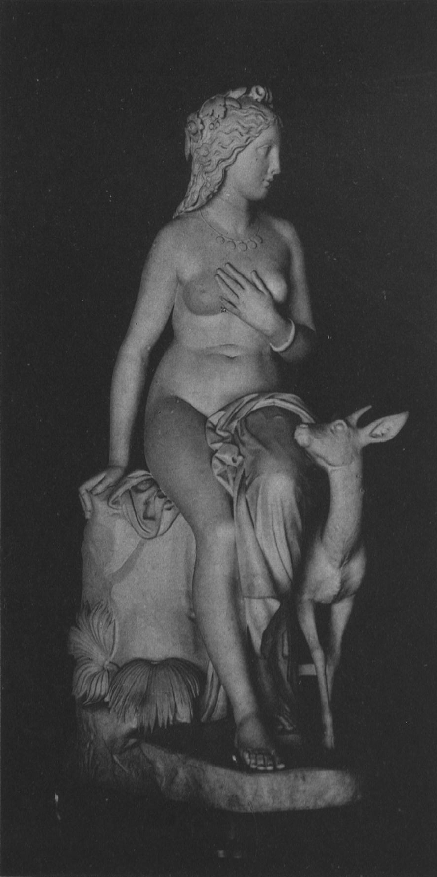 Johannes Cappeller, Sakondola mit Gazelle, Carraramarmor, 138 cm, 1859–1862.